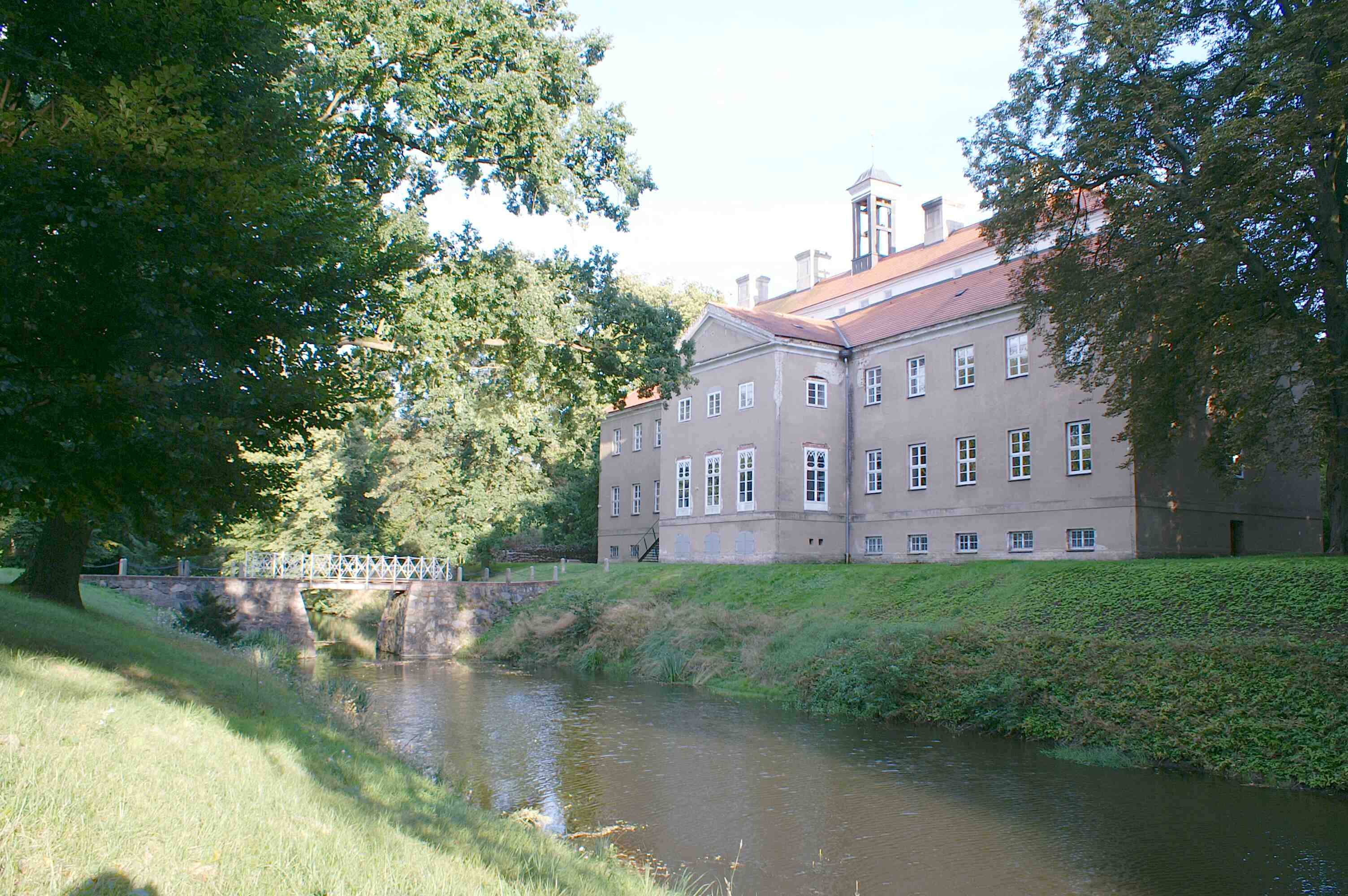 Griebenow - Landkreis Nordvorpommern - Schloss Griebenow, Parkseite mit Graben und Brücke